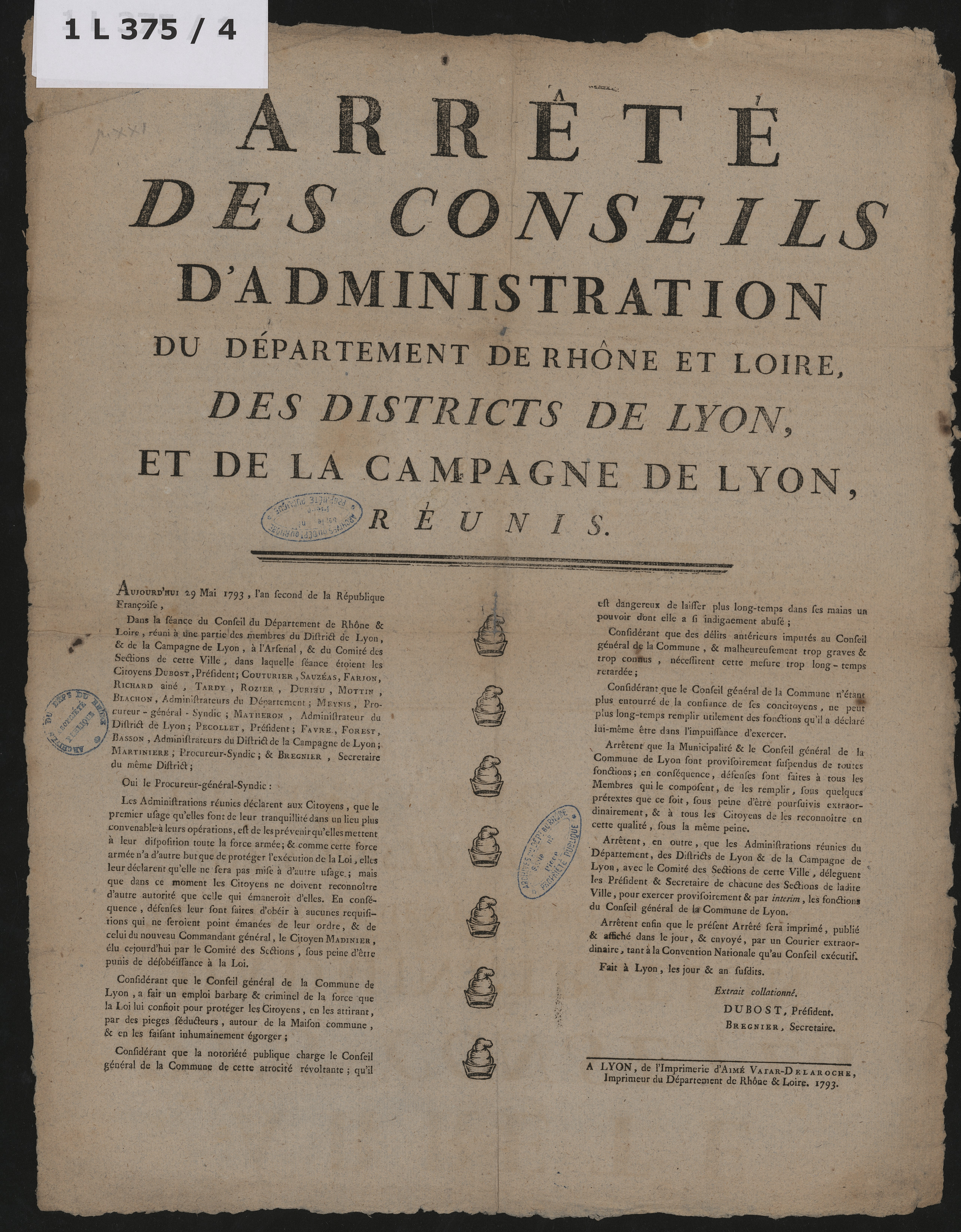 ADRML - 1 L 375/4